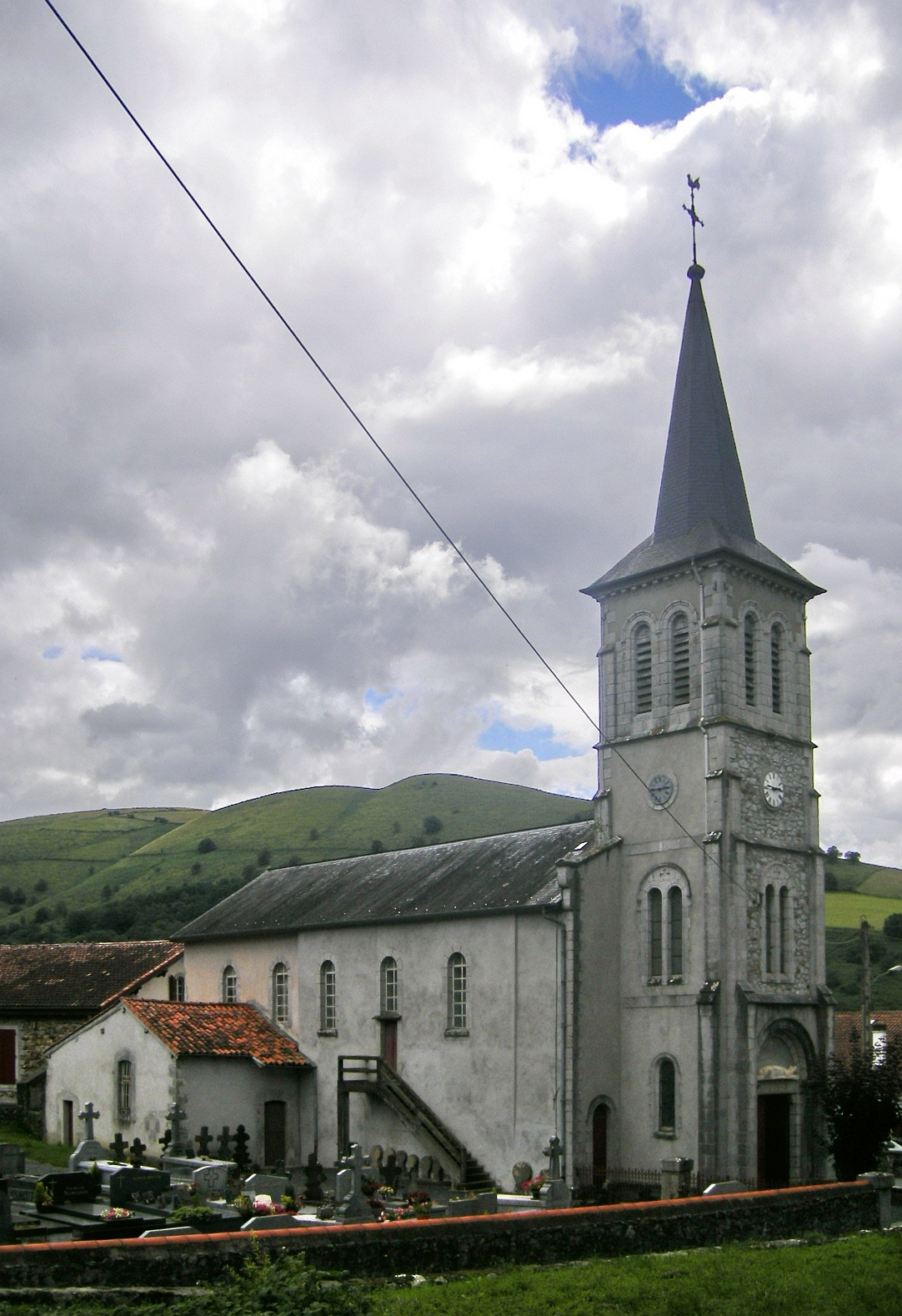 Lacarre